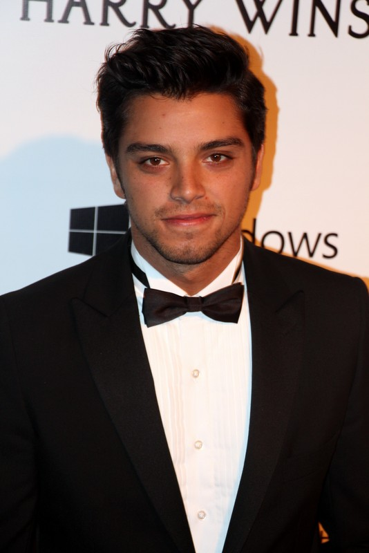 15 - Rodrigo Simas-003